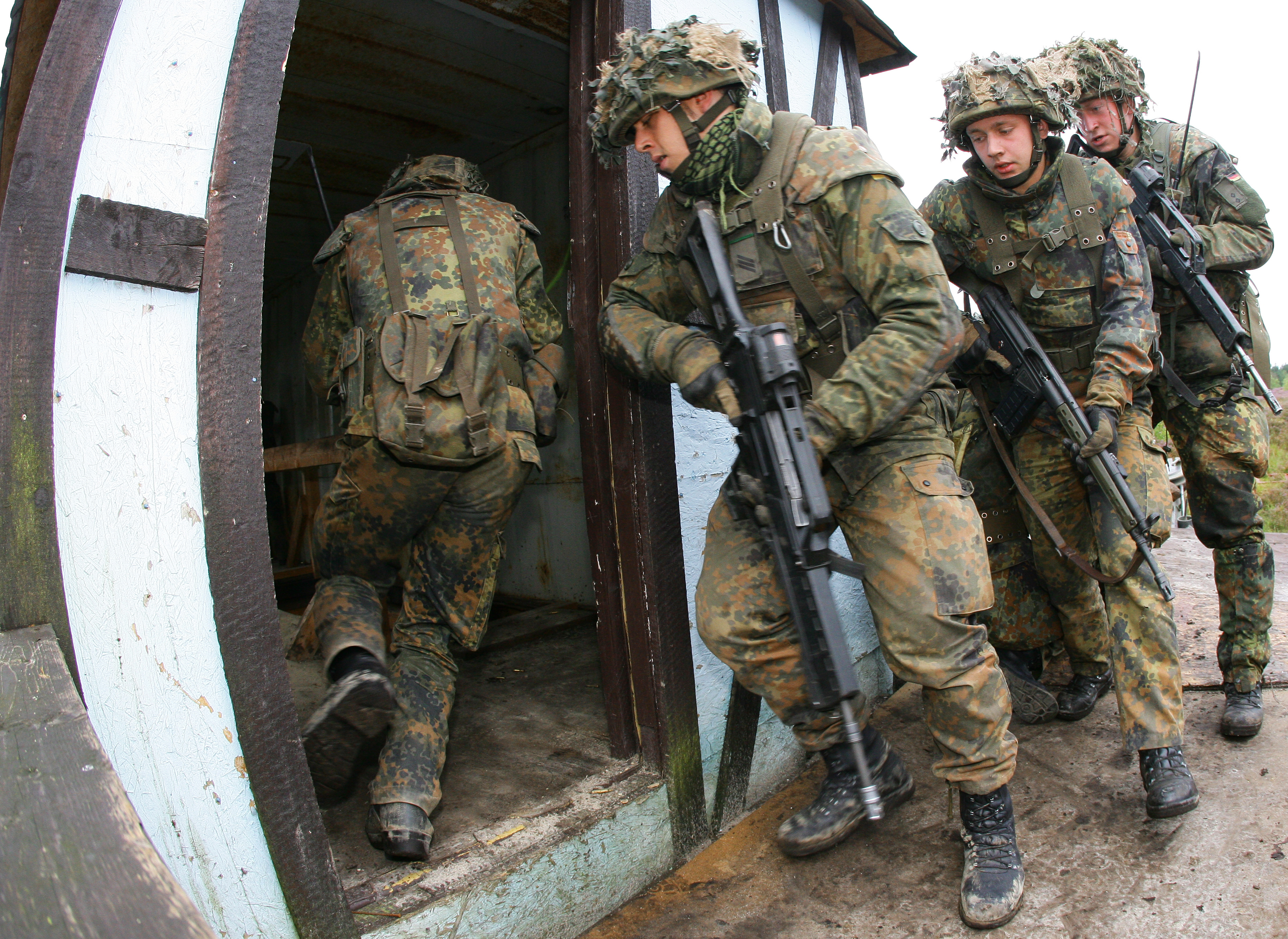 Panzergrenadiere des Panzergrenadierlehrbataillons 92 als Viermanntrupp beim Häuserkampf im Rahmen des Vorübens zur Informationslehrübung Heer am Ausbildungszentrum Munster.©Bundeswehr/Rott